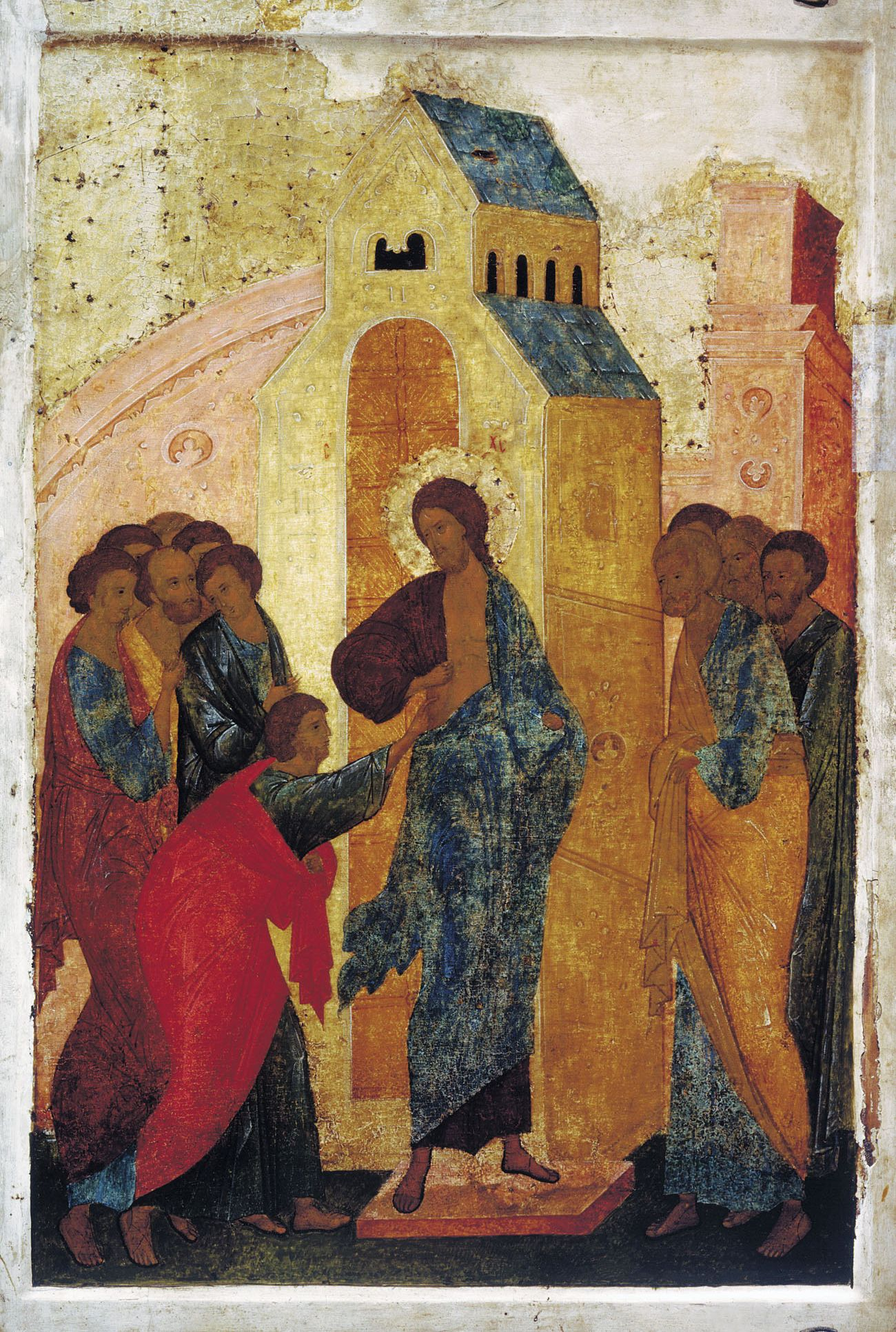 Уверение Фомы. Дионисий и мастерская. Икона из церкви Св. Троицы Павлова Обнорского монастыря. 1500 г. (ГРМ)